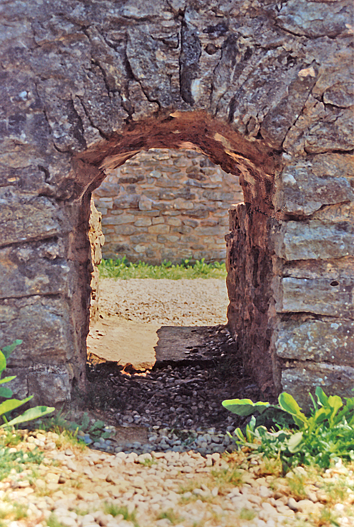 Heißluftzulaß im Bad des Kastells Theilenhofen (Iciniacum), Bayern.